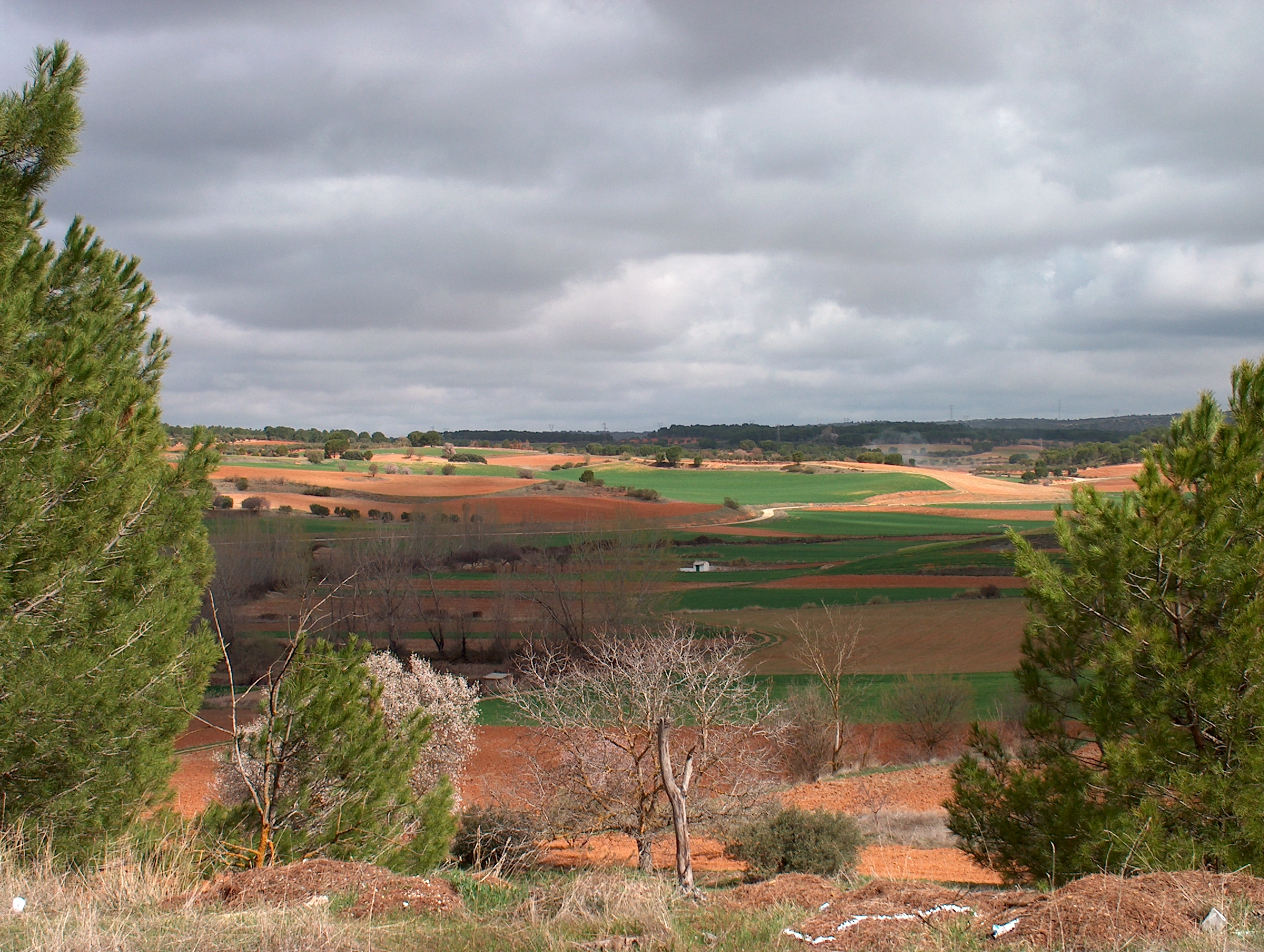 Imagen del campo al principio de la primavera entre Buenache y la ermita.